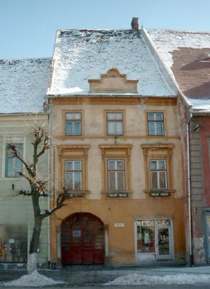 Andreo-Cseh-Haus in Hermannstadt (RO).